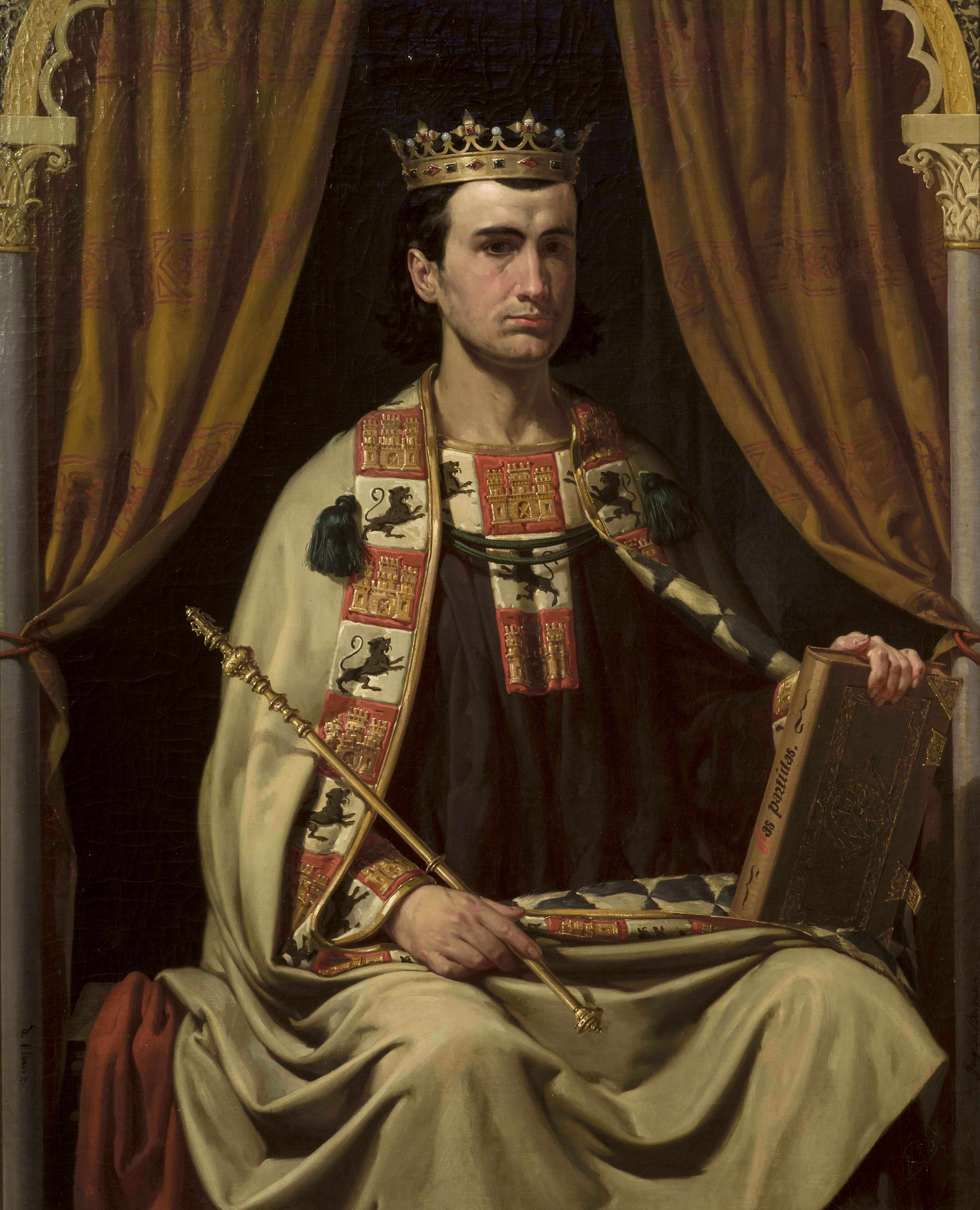 Retrato imaginario del rey Alfonso X de Castilla (1221-1284), que fue rey de Castilla y León e hijo de Fernando III de Castilla y de la reina Beatriz de Suabia. Alfonso X falleció en Sevilla en 1284, y sus restos mortales reposan actualmente en la Capilla Real de la catedral de Sevilla.